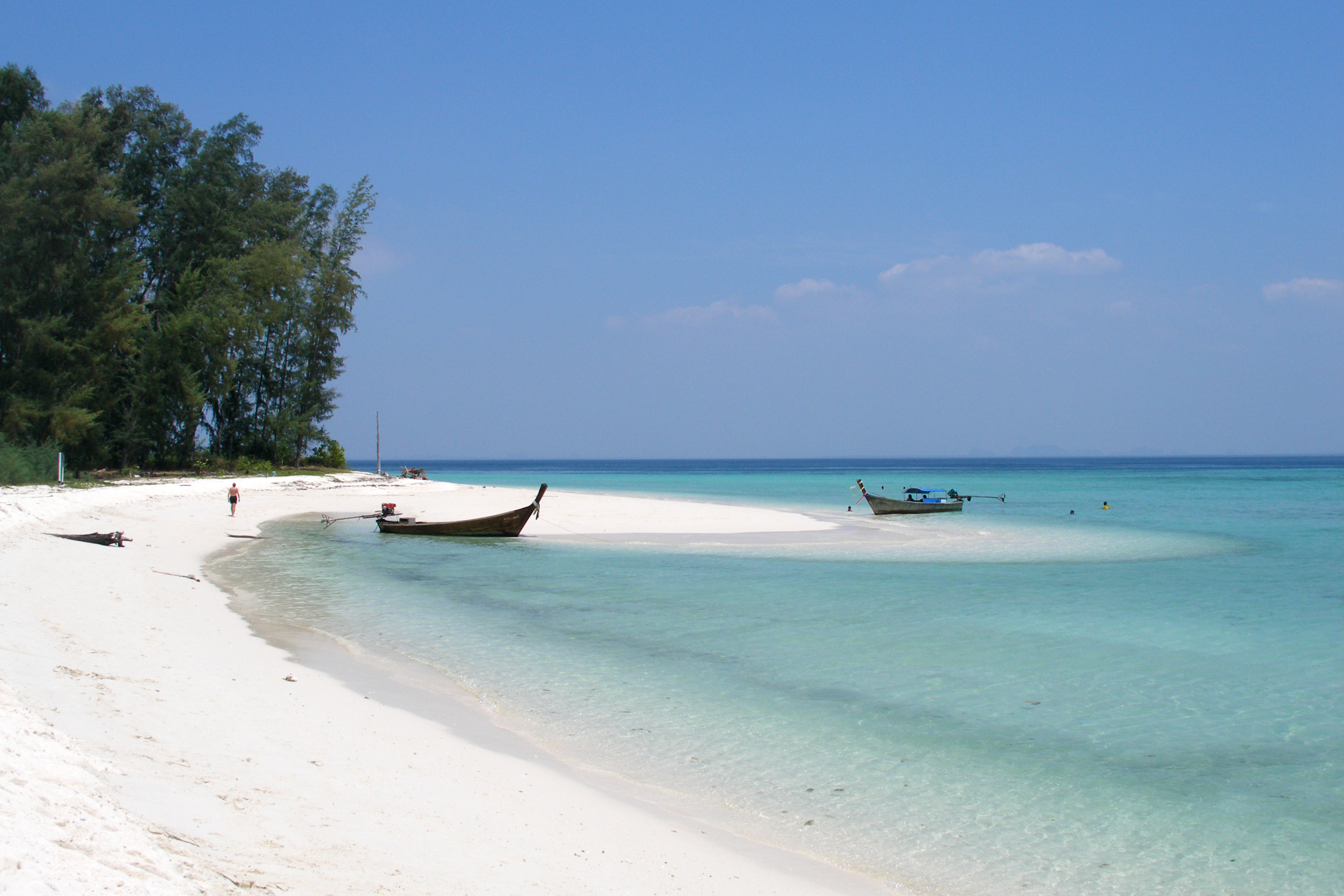 อุทยานแห่งชาติหาดนพรัตน์ธารา-หมู่เกาะพีพี